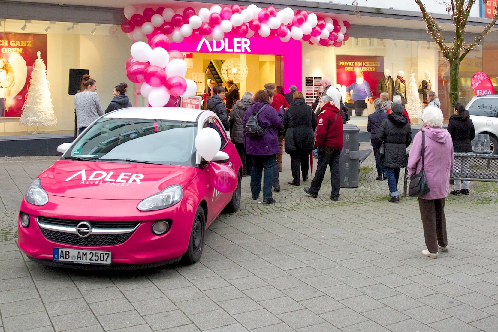 Modemarkt Neueröffnung in Solingen